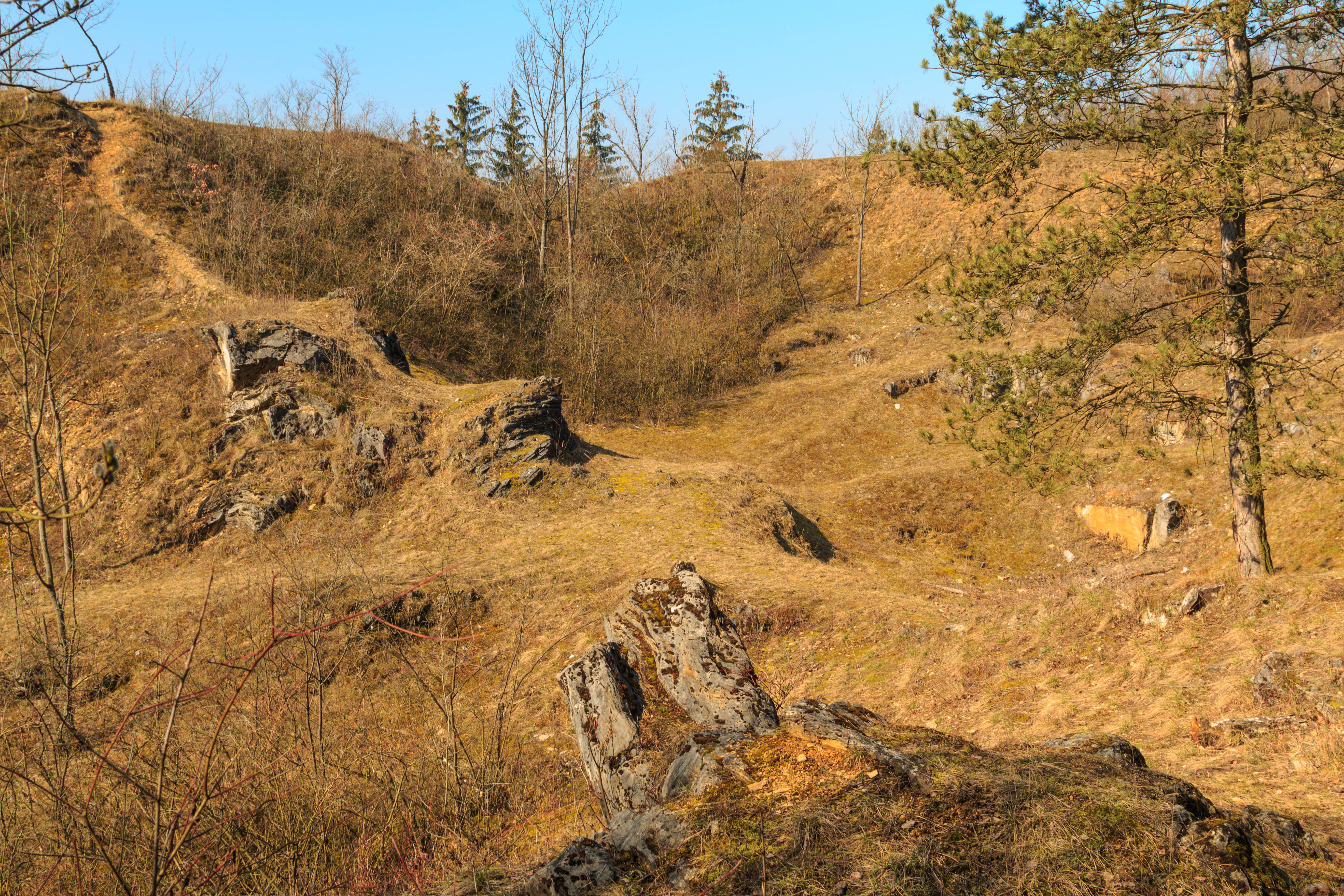 Cikánské zmoly - navrhovaná přírodní památka Project: Chráněná území